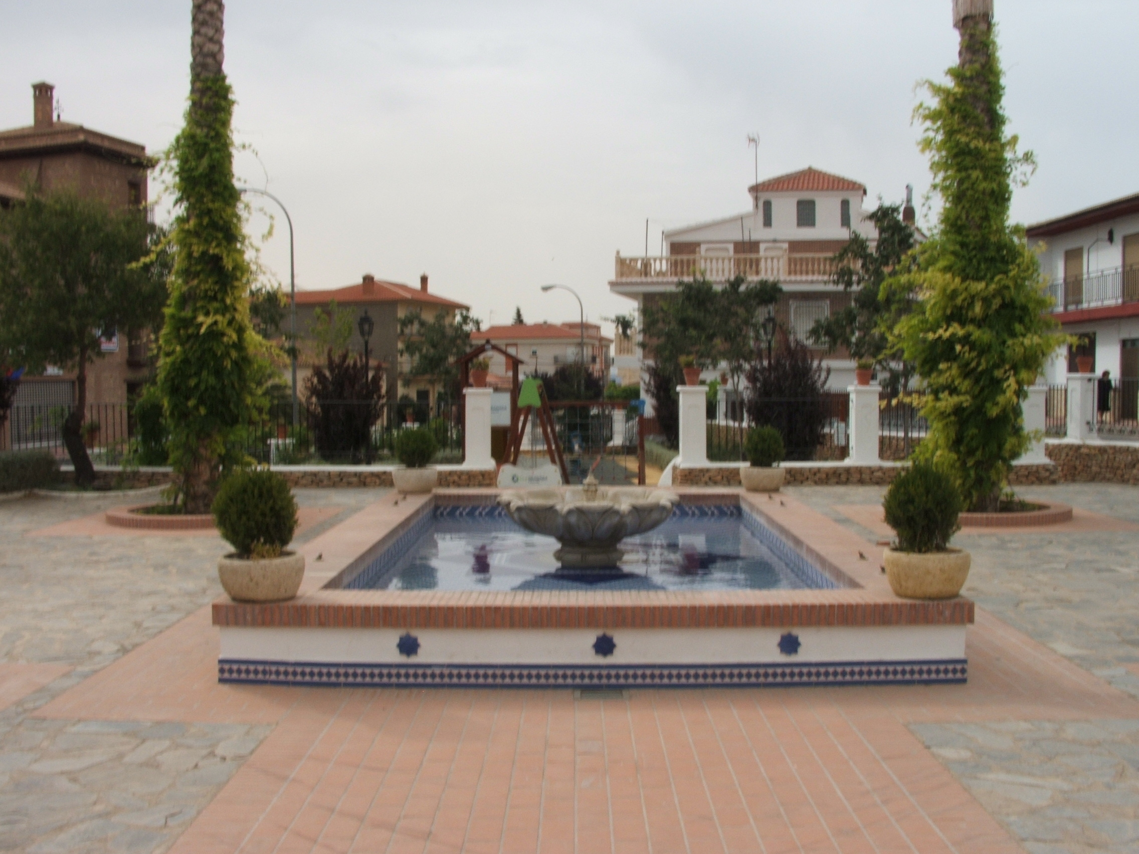 Parque Al-Xustari, En Exfiliana.